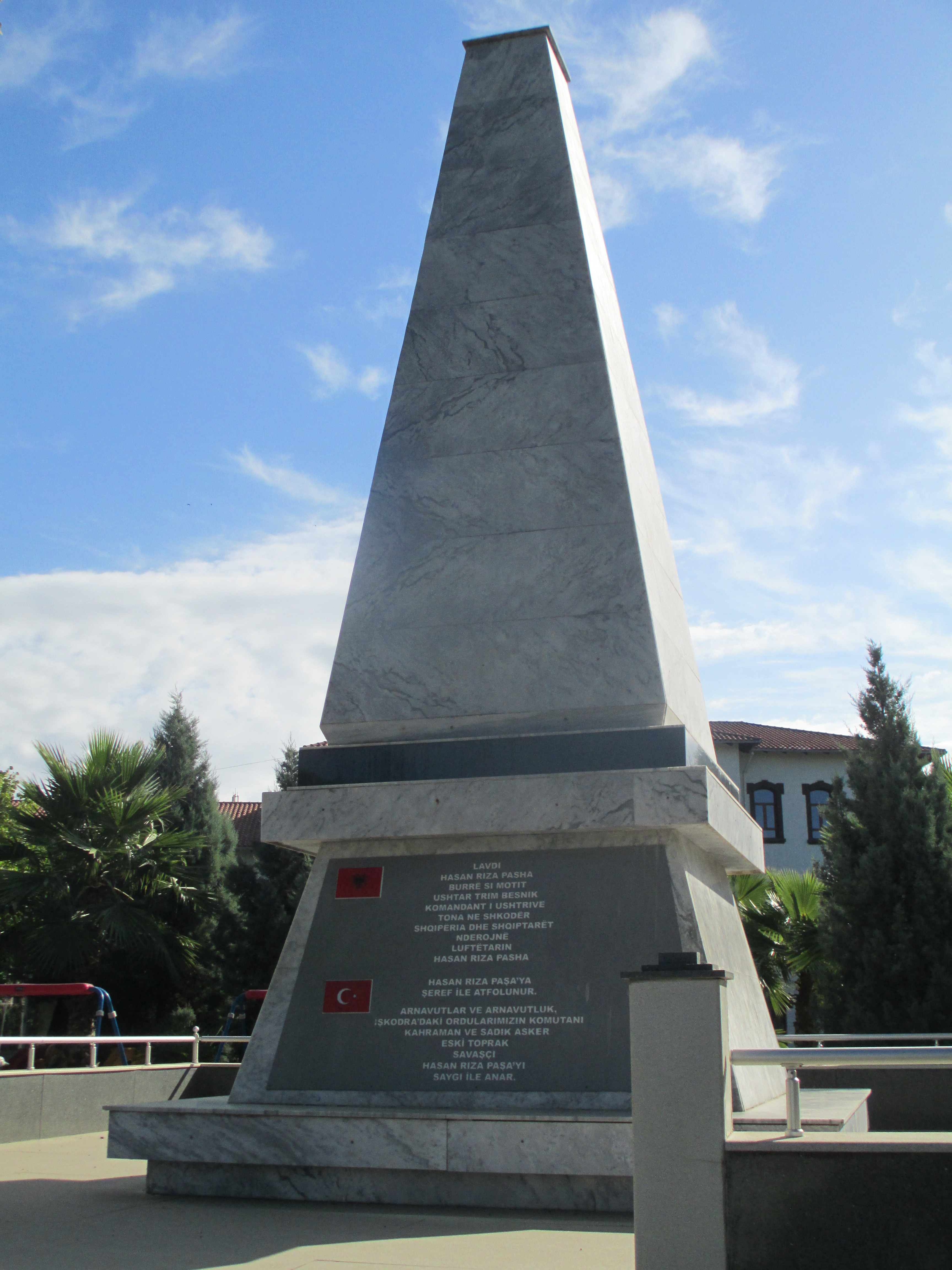 אנדרטה לחסן ריזה פאשה בשקודרה